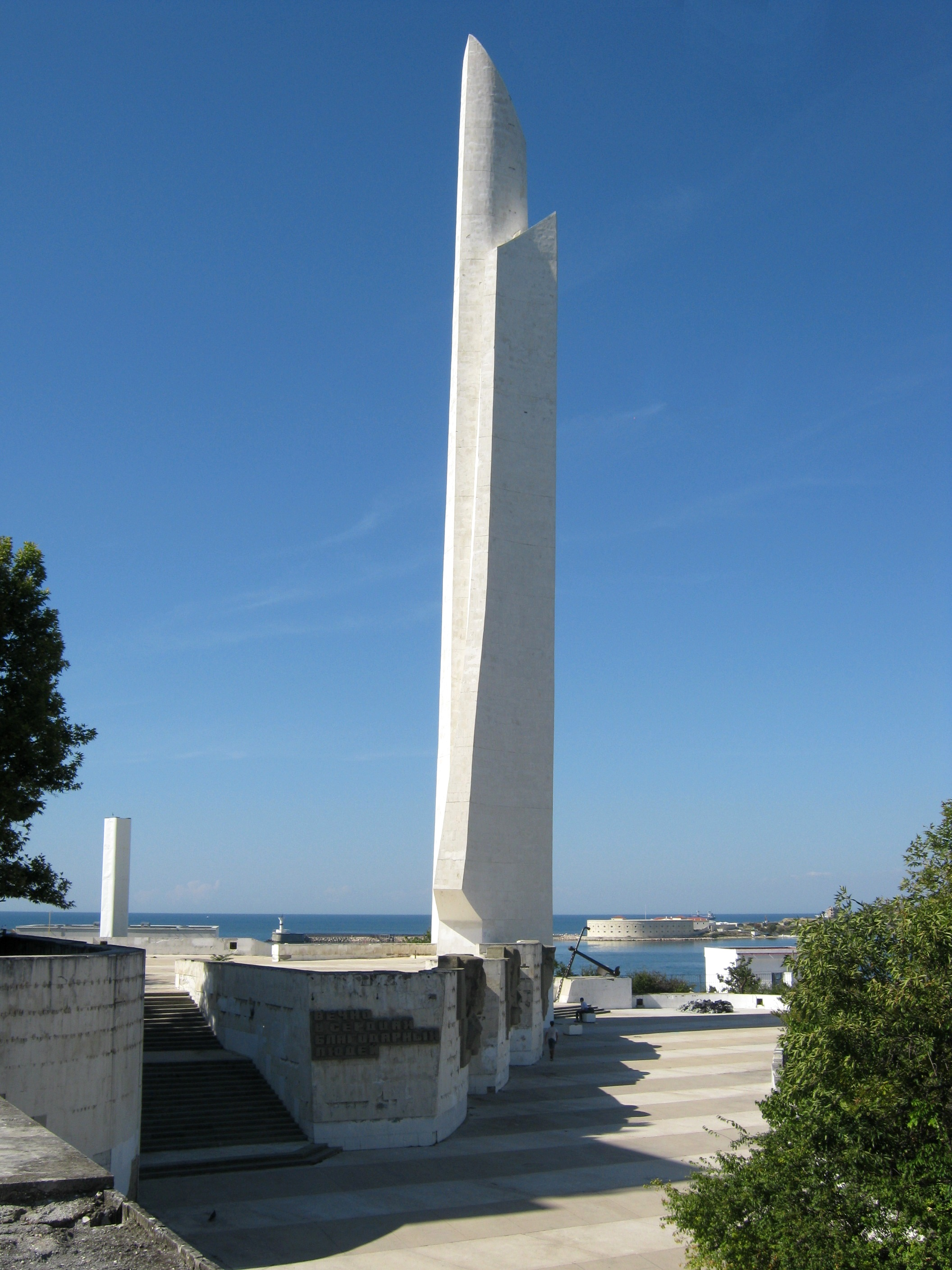 Обелиск «Городу-Герою Севастополю» (общий вид)